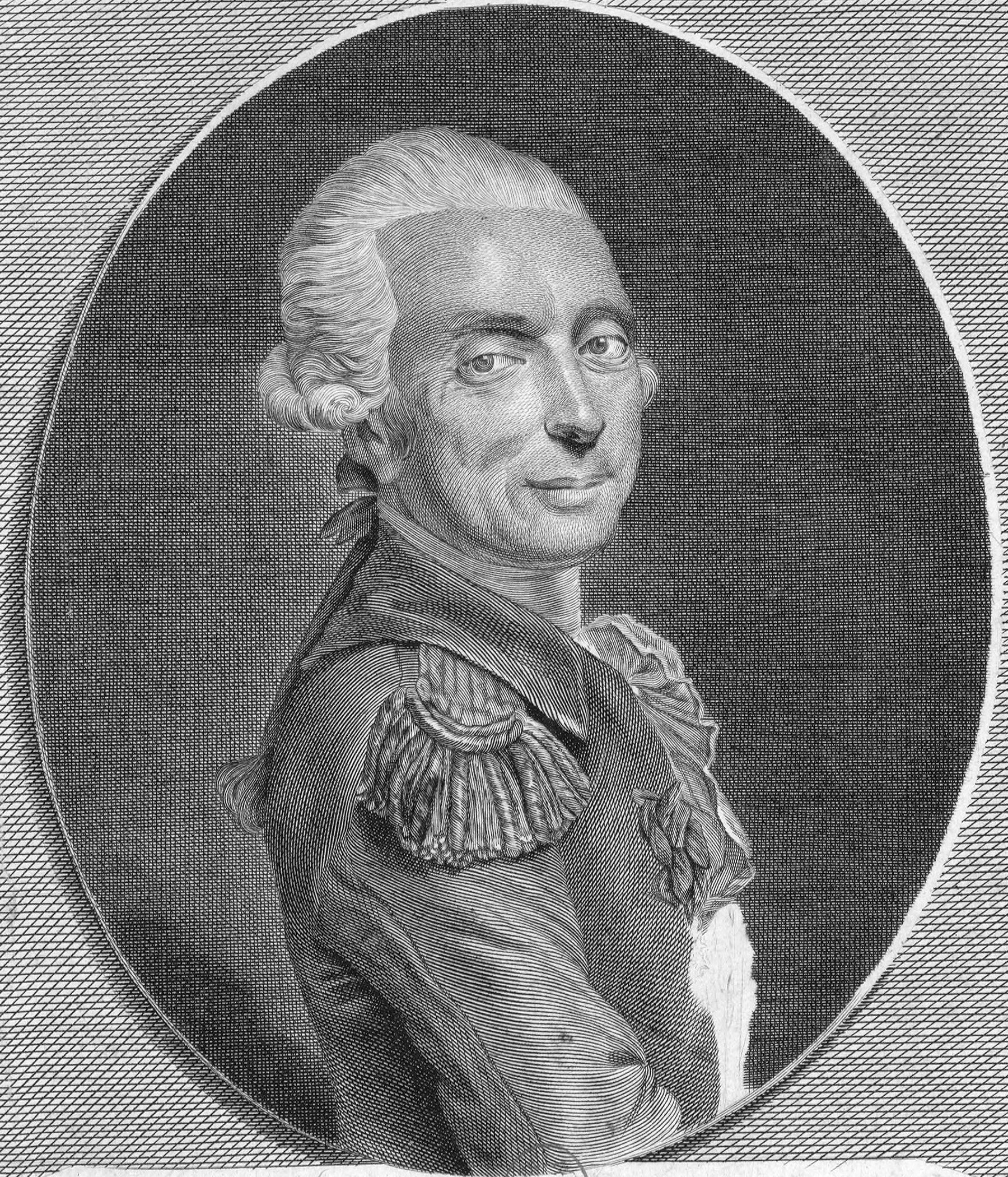 French engineer and balloonist François Laurent d'Arlandes (1742-1809)